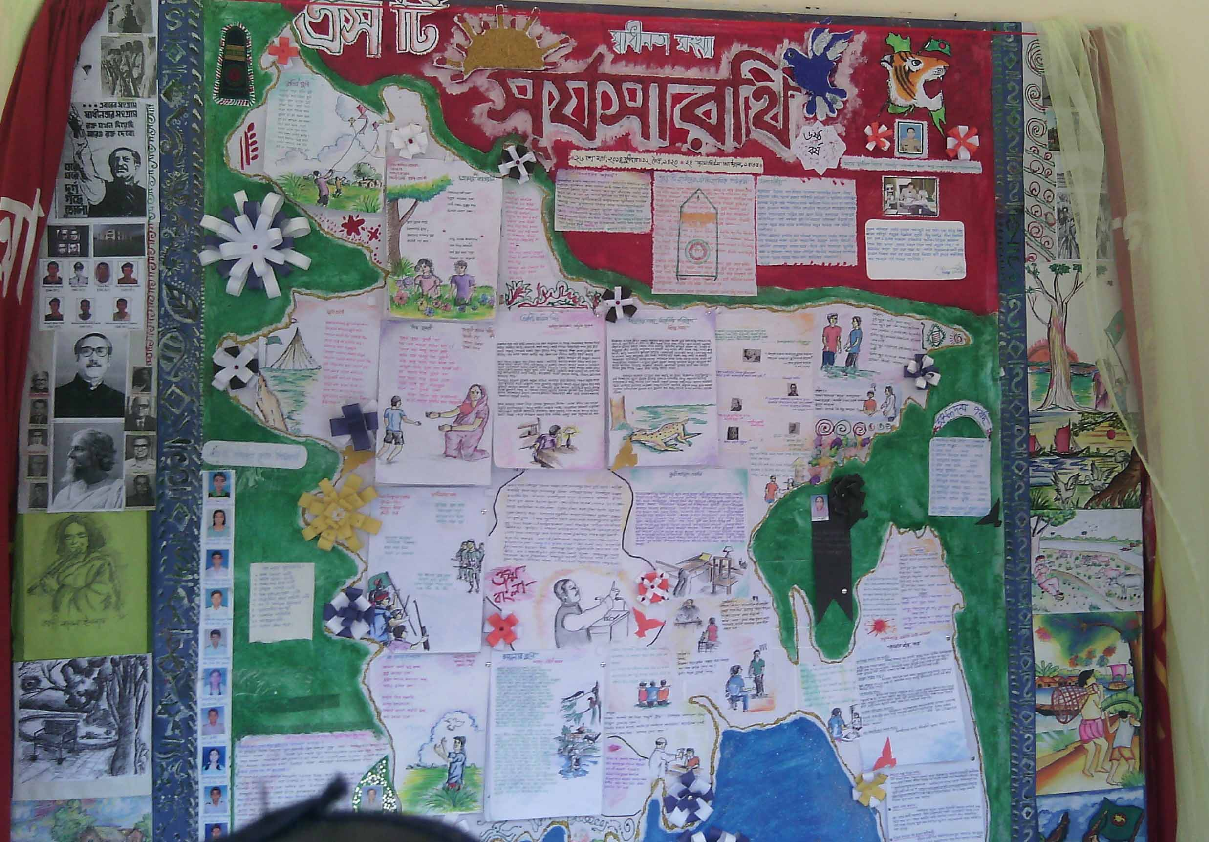 দেয়াল পত্রিকার একটি নিদর্শন